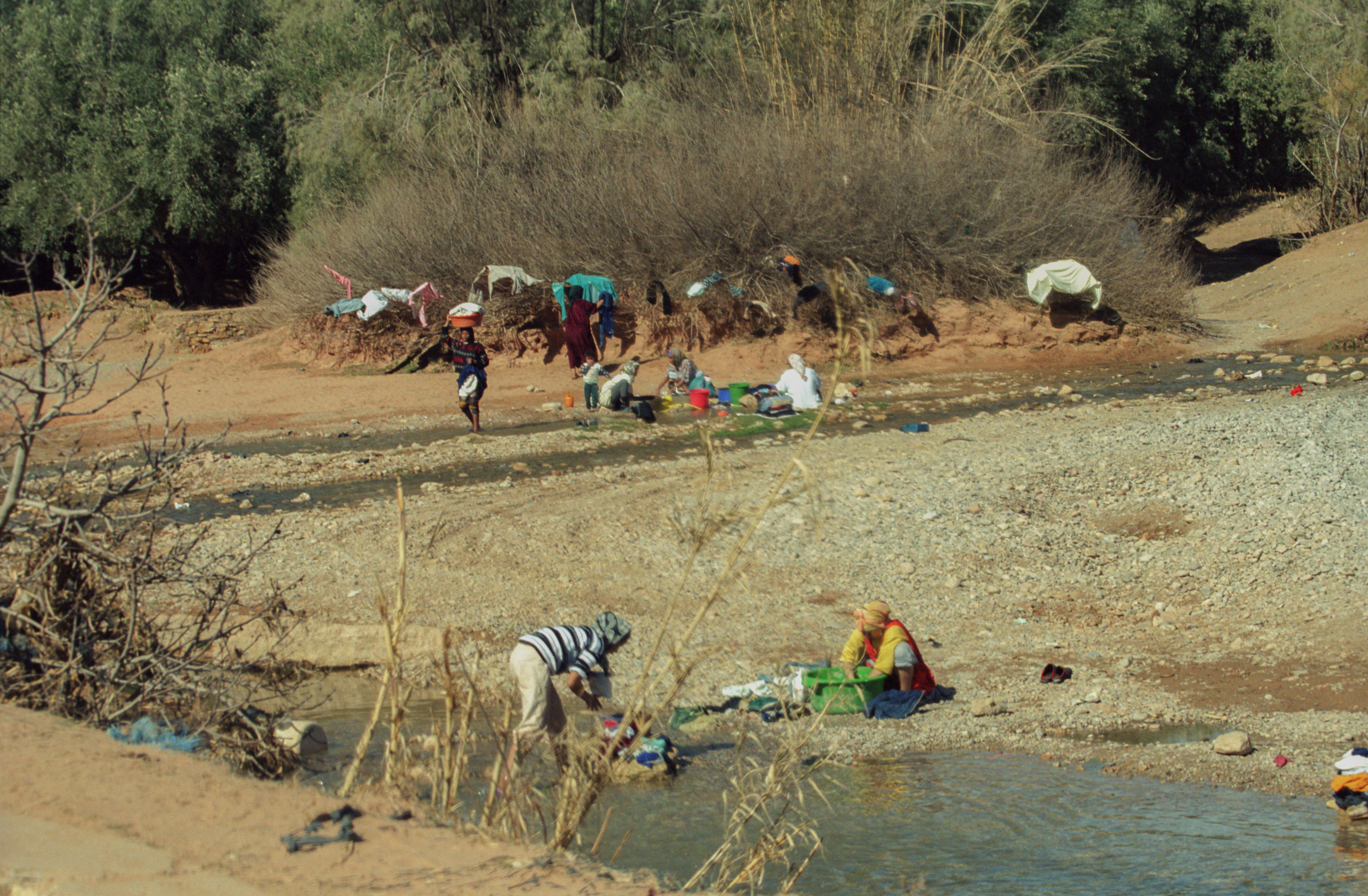 Atlas, Morocco, Dades Valley, Dades river